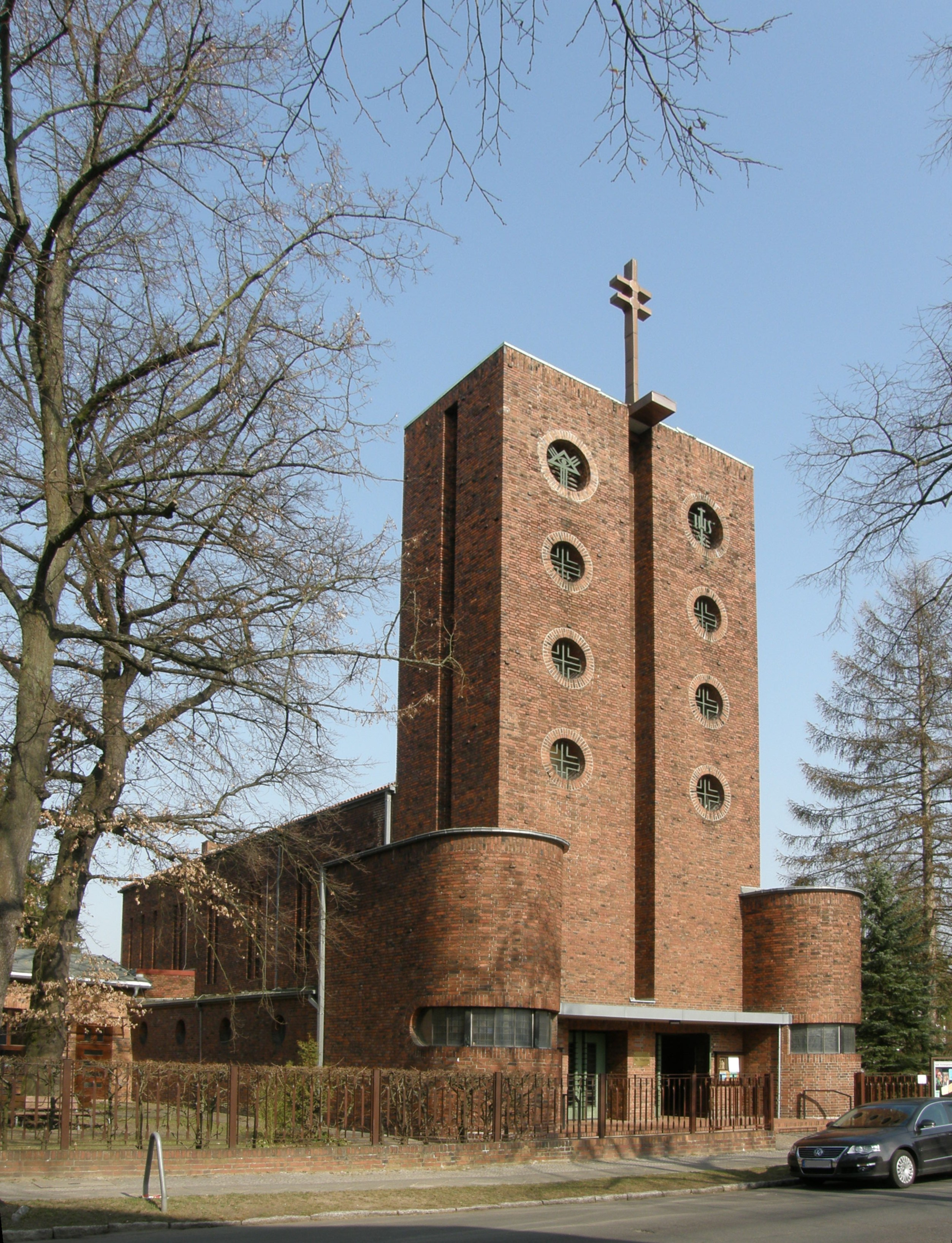 Berlin-Kaulsdorf, St.-Martinskirche